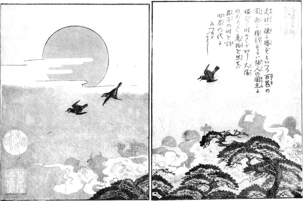 Hinode (日の出, Sunrise) from the Konjaku Gazu Zoku Hyakki (今昔画図続百鬼)